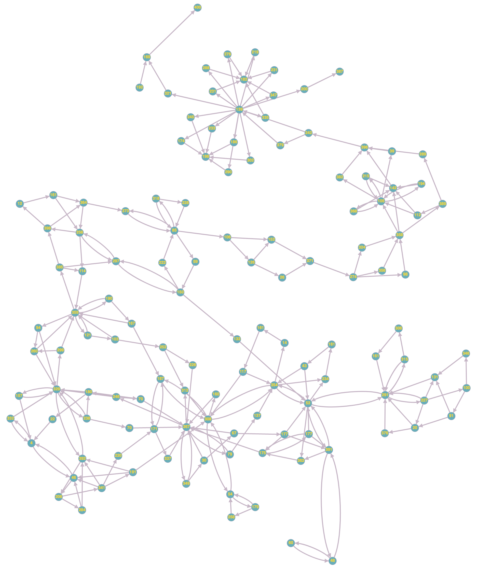 Graphe de la structure du labyrinthe dans le livre-jeu Le Sorcier de la Montagne de Feu, entre l'entrée du labyrinthe (paragraphe 48, en bas) et la victoire (paragraphe 400, en haut). Source de l'image